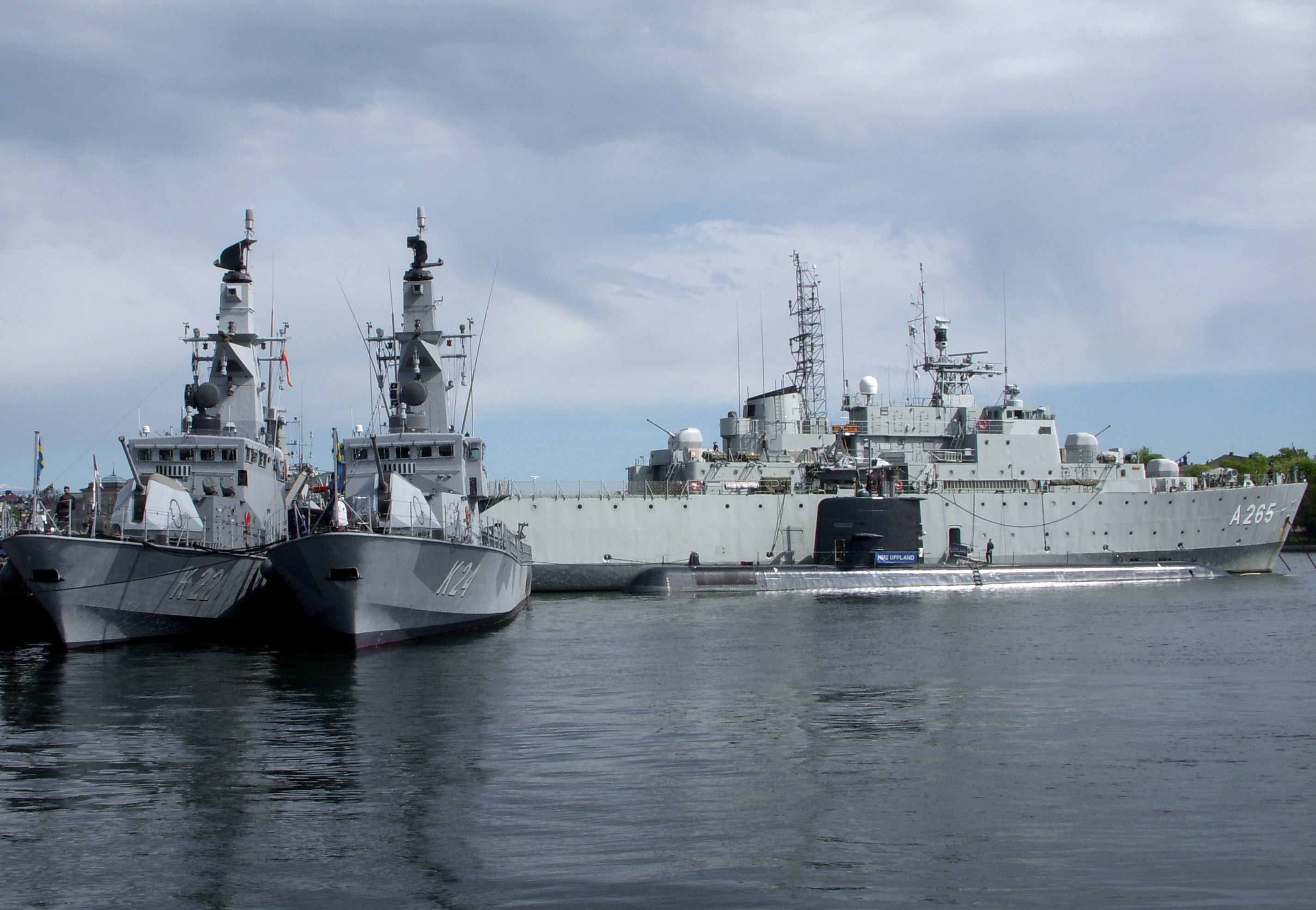 Ubåt HMS Uppland (Upd) med HMS Visborg (A265) vid Skeppsbron i Stockholm. Till vänster korvetterna HMS Gävle (K22) och HMS Sundsvall (K24).